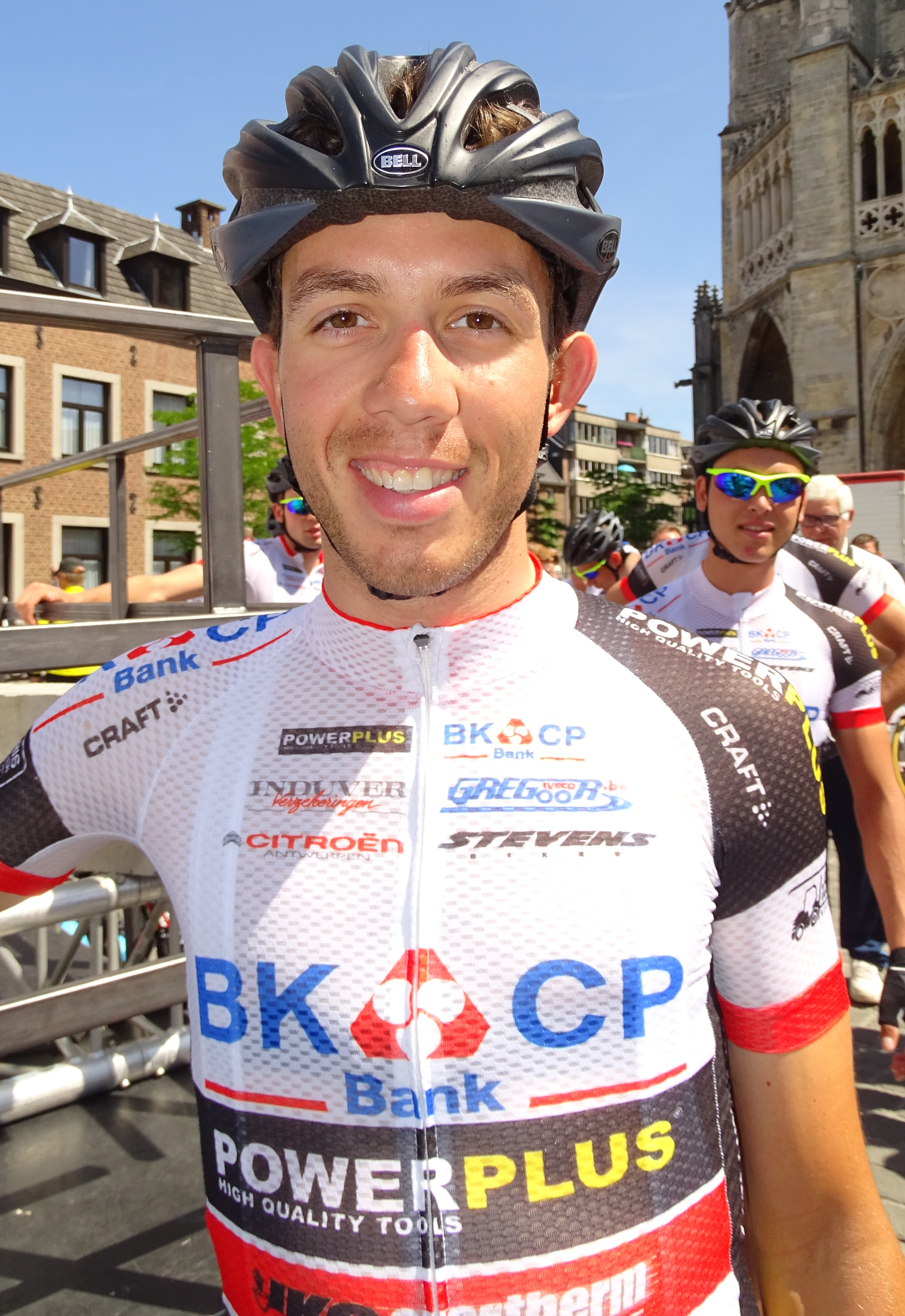 Reportage réalisé le dimanche 14 juin à l'occasion du départ et de l'arrivée du Tour du Limbourg 2015 à Tongres, Belgique.